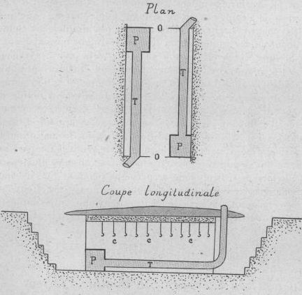 Plan al cuptorului de dezinsecţie a efectelor militare folosit de către Armata României în Primul Război Mondial. P - sobă de cărămidă alimentată din exterior, cu suprafaţă superioară metalică, prelungită cu T - un coş de fum orizontal situat la 25 cm deasupra solului (cu rol de mărire a suprafeţei radiante); C - cârlige de agăţat efectele militarilor